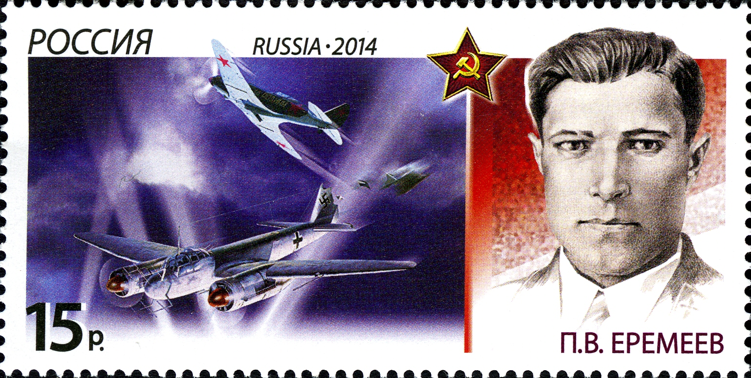 История авиации. Воздушные тараны; (Пётр Васильевич Еремеев)